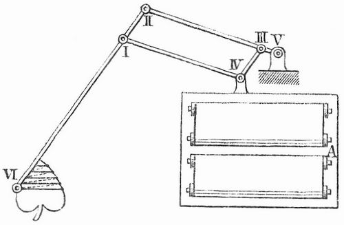 Storchschnabel (Pantograph) einer Handstickmaschine